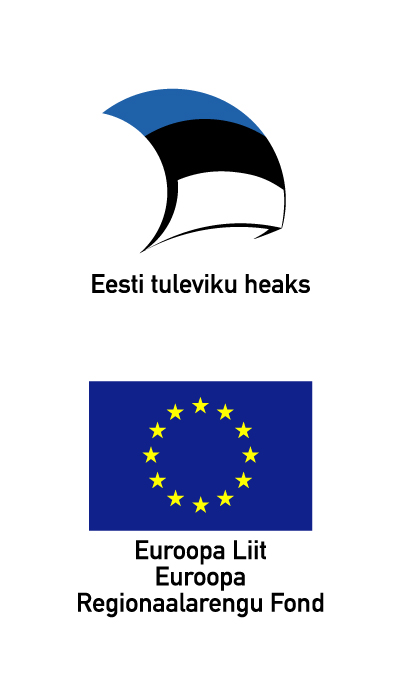 Euroopa Regionaalarengu Fondilt toetust saanud projektidel kohustuslikus korras kasutatav logo.